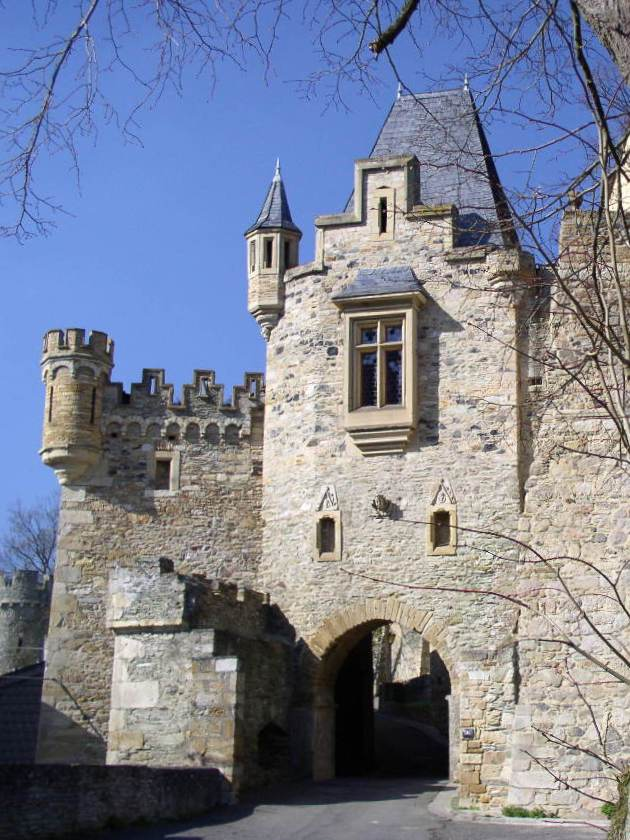 Eingangsportal Schloss Dhaun